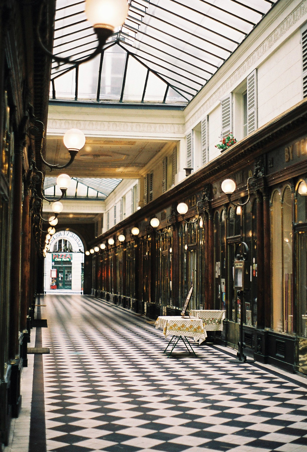 Photo intérieur de Galerie Véro-Dodat